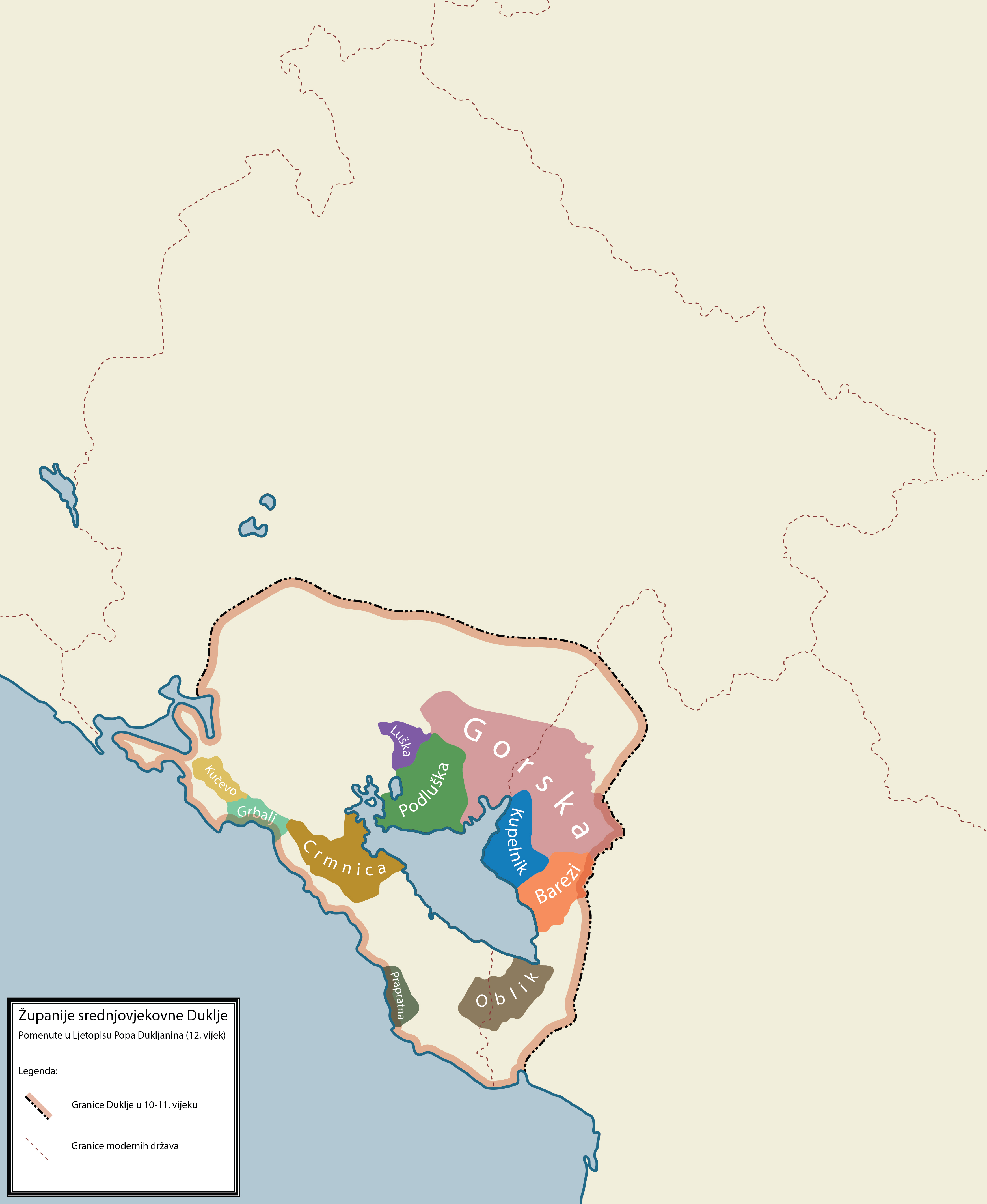 Српски (ћирилица): Карта која приказује све познате жупе или жупаније у Црној Гори, поменуте у Љетопису Попа Дукљанина из 13. вијека